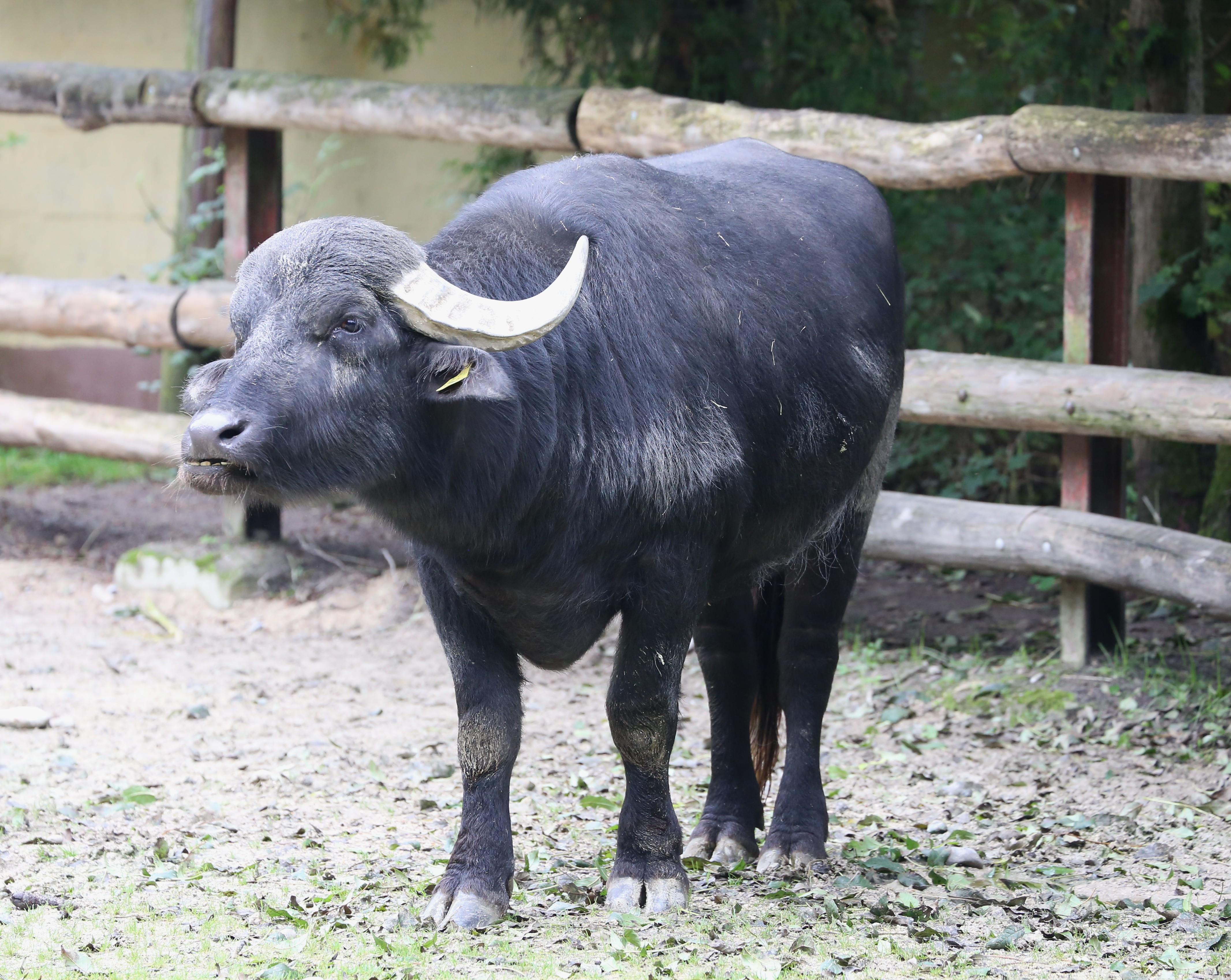 Zoo Augsburg